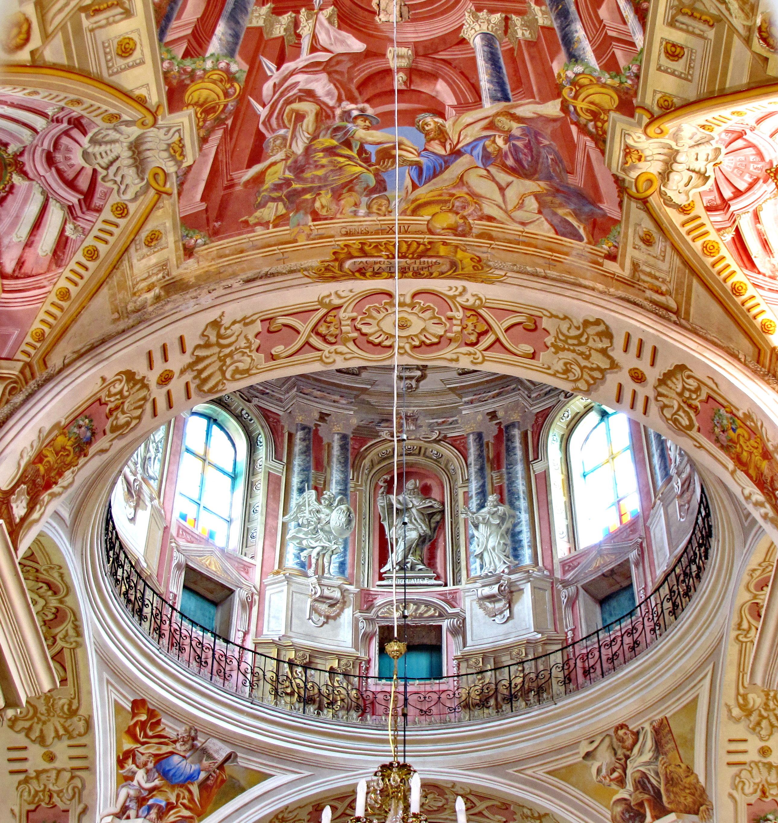 Беларуская (тарашкевіца): Комплекс былога кляштара езуітаў:касьцёл Божага Цела з дэкаратыўным аздабленьнем:росьпісы ў інтэр’еры, выкананыя пад кіраўніцтвам К. Д. Гескага; алтарная карціна «Тайная вячэра» К. Д. Гескага;надмагільныя помнікі і барэльефы: Мікалая Крыштапа Радзівіла Сіроткі, Канстантына Радзівіла, Эльжбеты Яўфіміі Радзівіл, Крыштапа Радзівіла, Ігната Мураўскага, Канстанцыі Радзівіл, Людвіка Кандратовіча (У. Сыракомля);скульптуры на галоўным фасадзе:Сьв. Крыштапа, Сьв. Мікалая, Сьв. Францішка Ксаверыя, Ігнація Лаёлы;пахавальная крыпта роду Радзівілаў (70 трун-саркафагаў, канопа і урна з прахам);вежа;капліца Булгарына;агароджа з брамай. г. Нясьвіж This is a photo of Belarusian heritage monument. Reference number: 610Г000465 ( WLM)